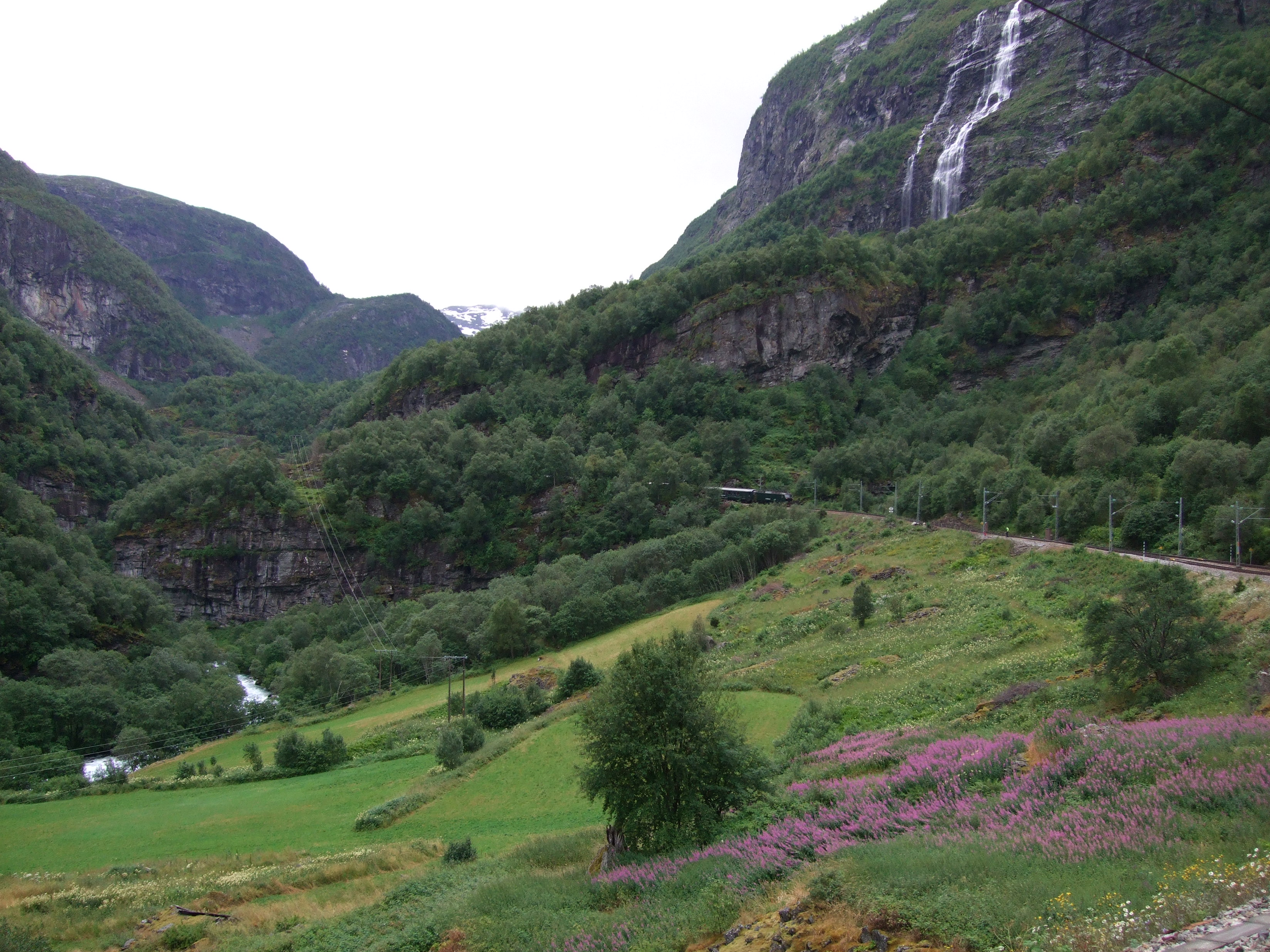 Flåmsbana